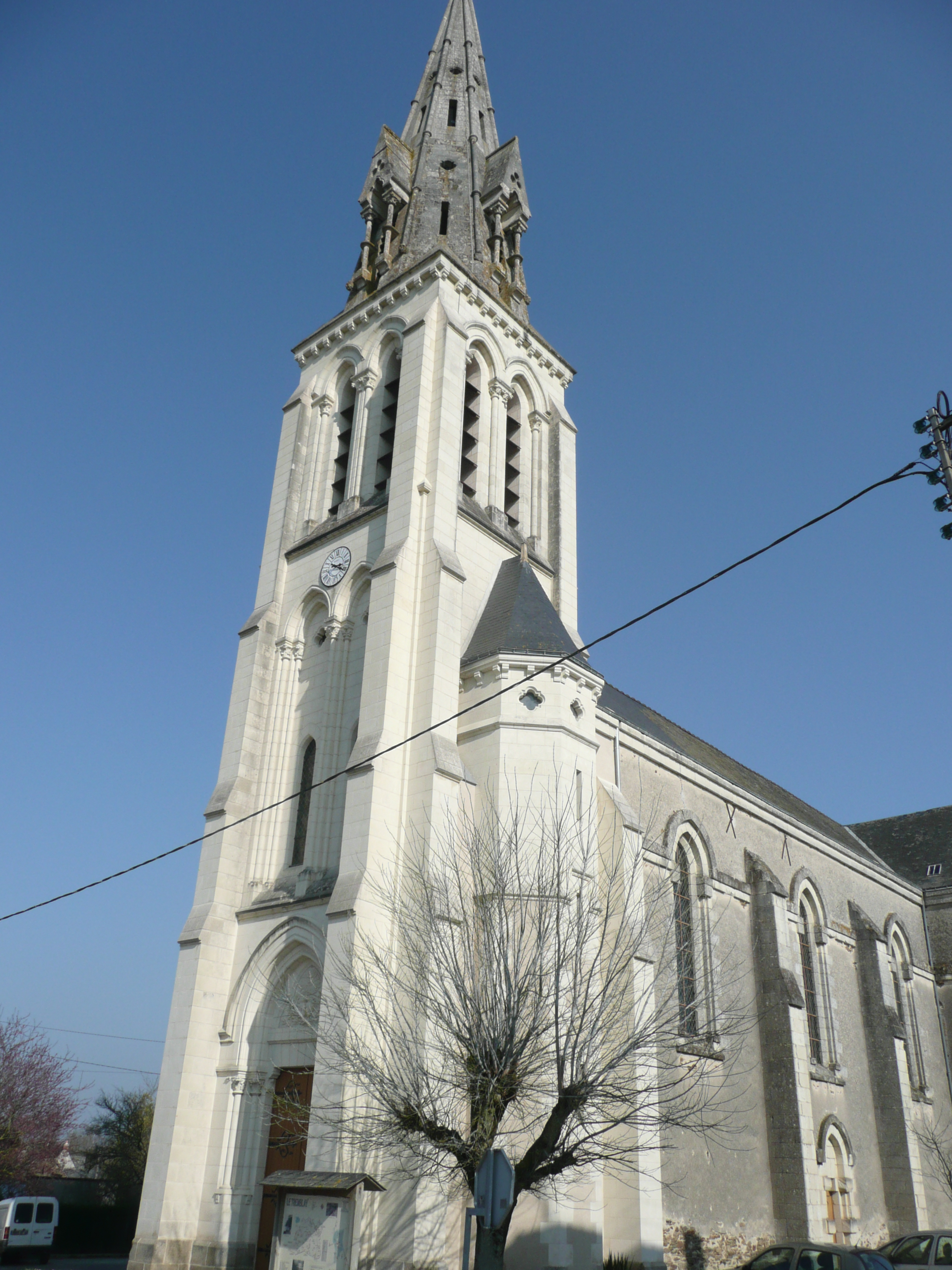 Église du Tremblay